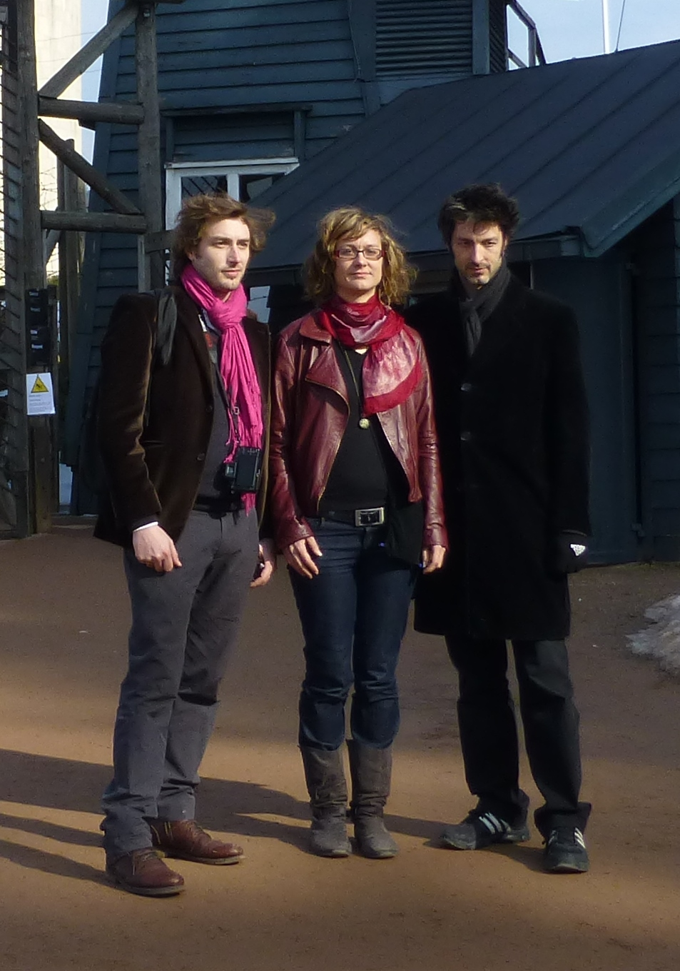 Axel Ramonet, Sonia Rolley et Tancrède Ramonet, réalisateurs du film documentaire Au nom de la race et de la science. Strasbourg 1941-1944, dans l'objectif d'un photographe de Wikimedia France, à l'entrée du camp du Struthof en 2013 (crop).